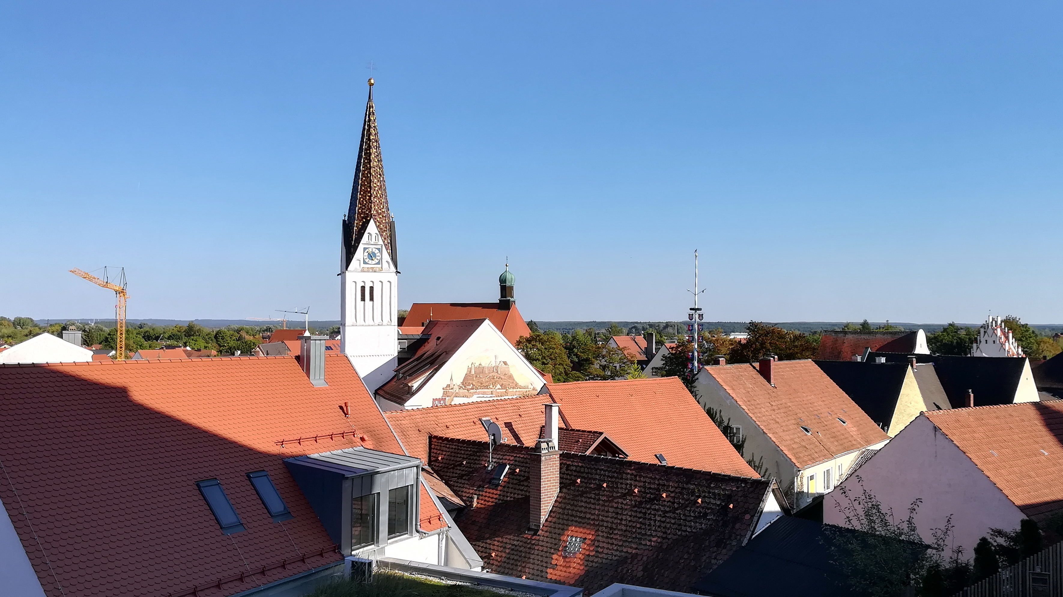 Ehemalige katholische Pfarrkirche St. Andreas, jetzt Rathaus